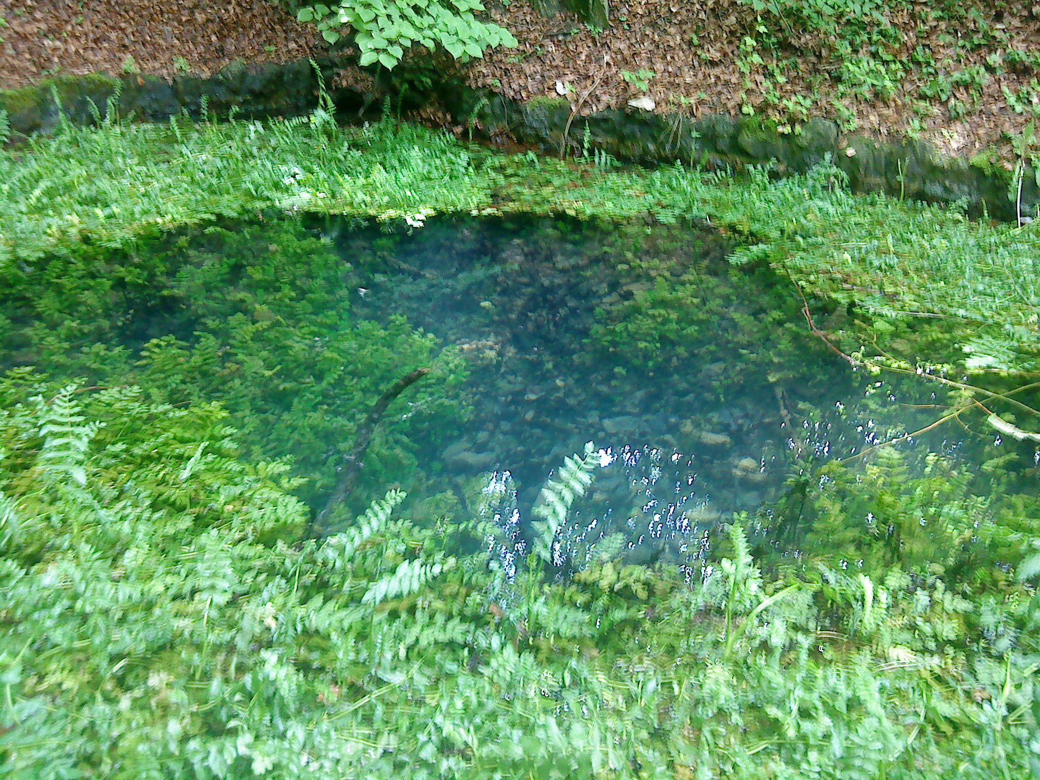 Der Quellaustritt des Grüntopfes